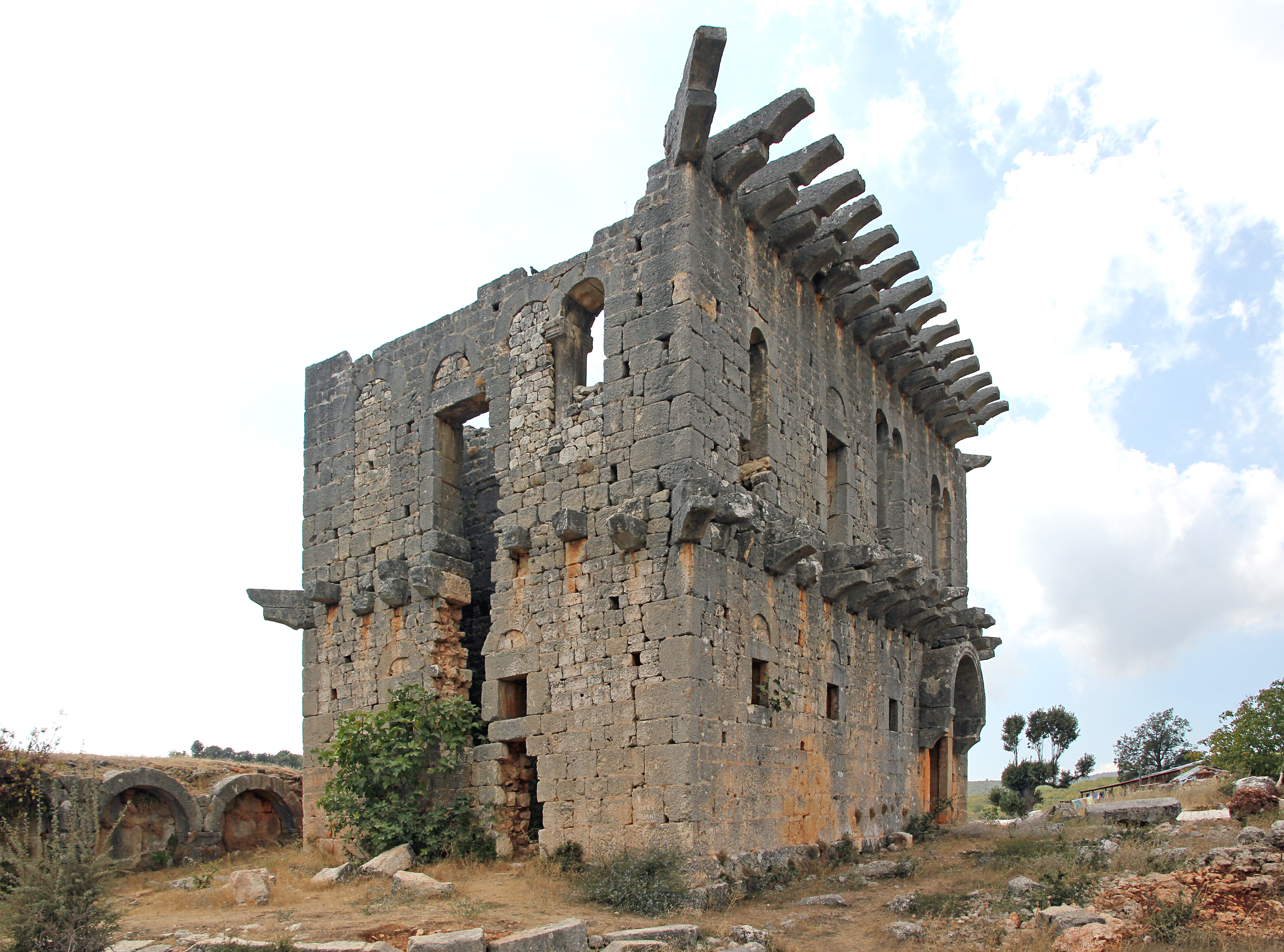 Üçayaklı, römische Villa mit Nebengebäuden im Rauhen Kilikien bei Erdemli, Südtürkei, Hauptgebäude von Nordosten